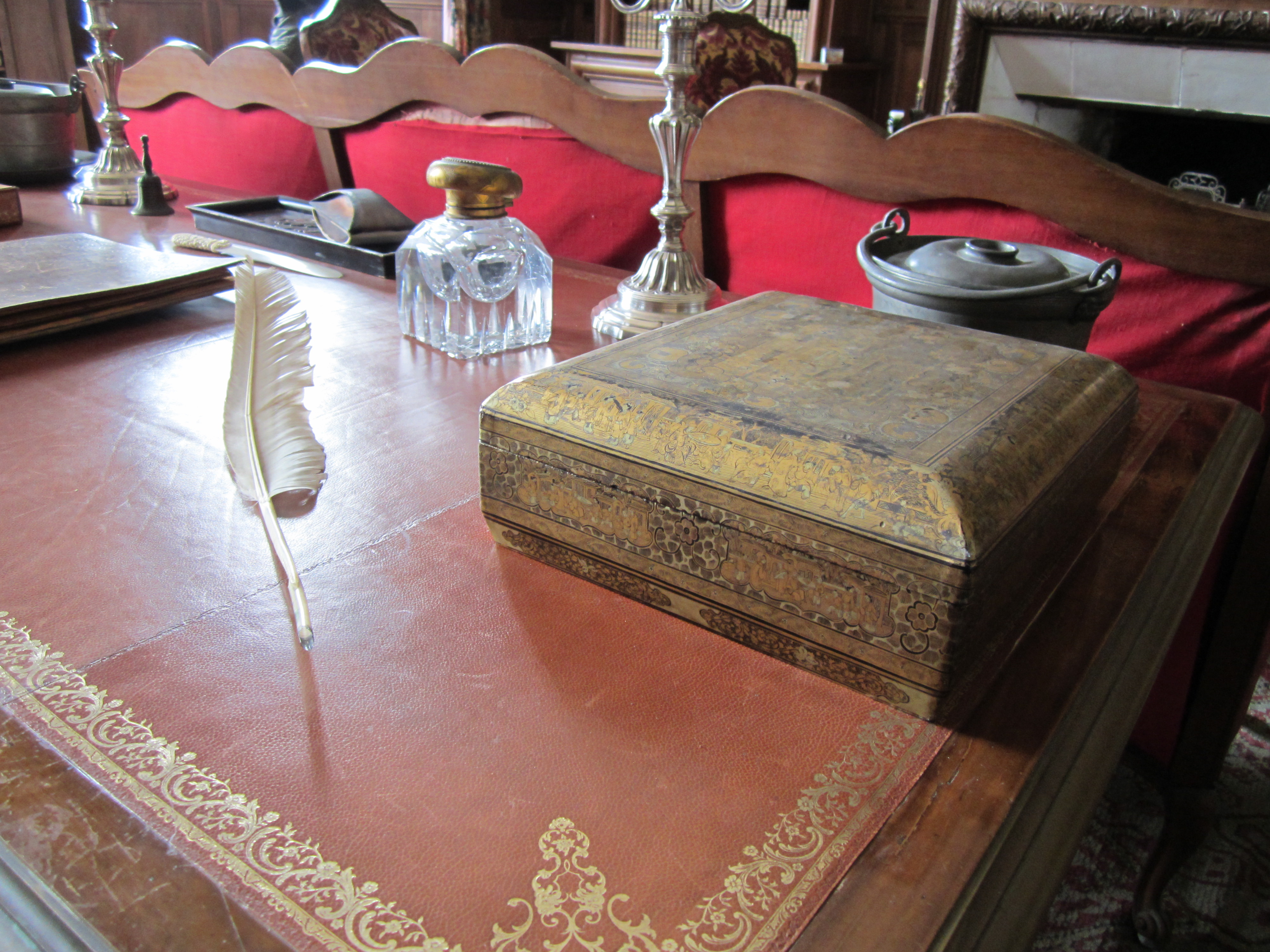 Château de Tocqueville, Manche. La bibliothèque d'Alexis de Tocqueville et son décor sont classé au patrimoine .